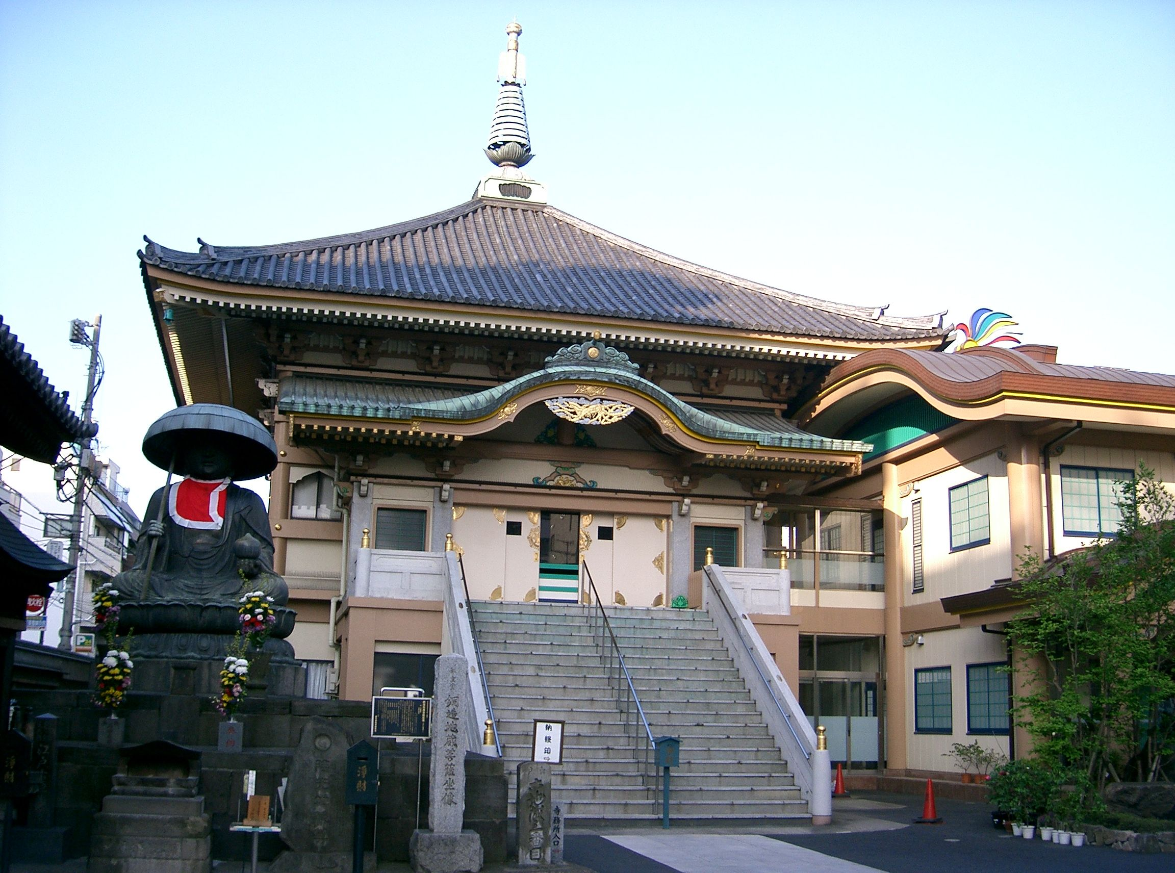 真言宗豊山派・真性寺（しんしょうじ）